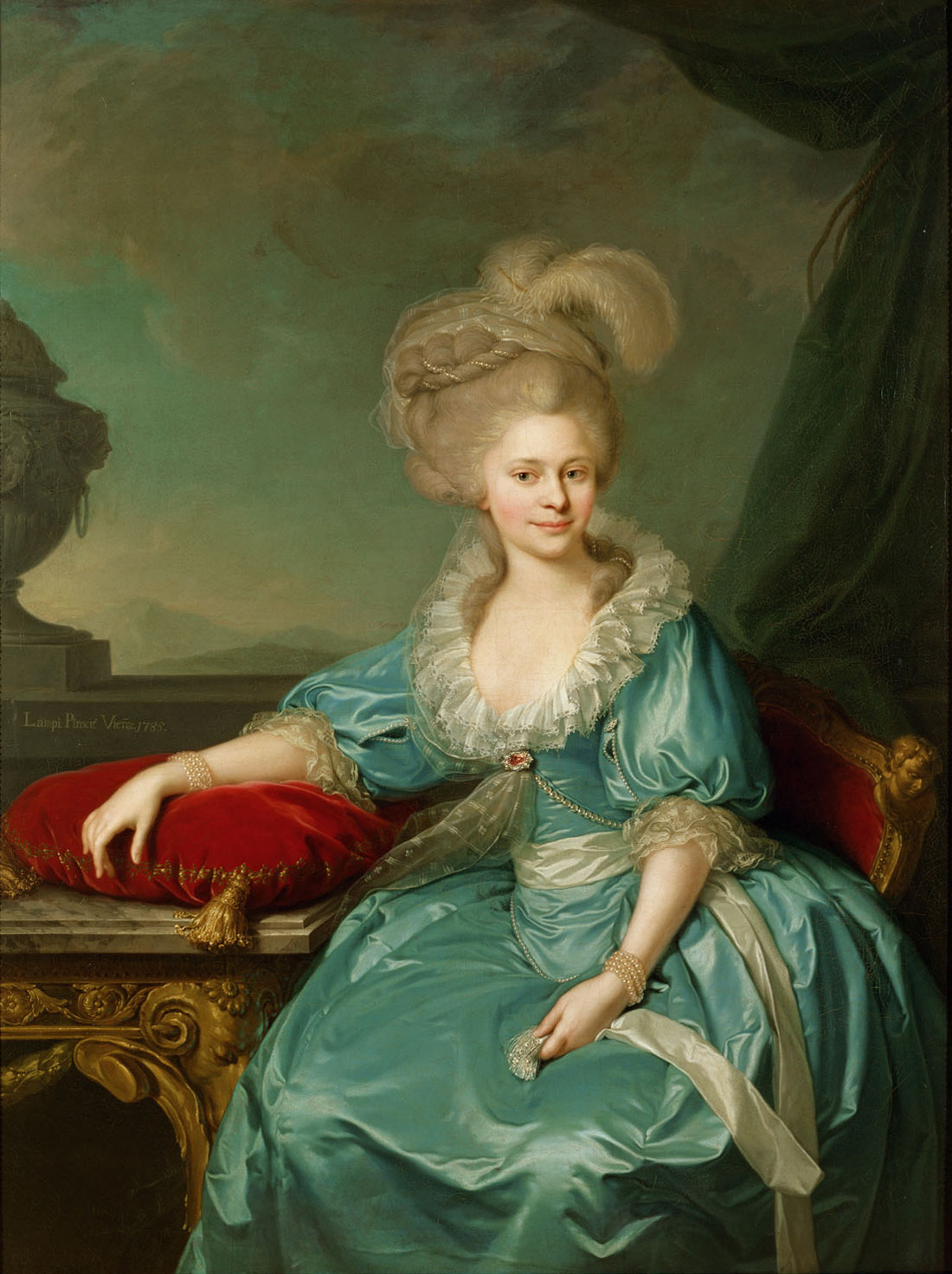 Elisabeth Wilhelmine von Württemberg (1767-1790), 1. Gemahlin von Franz II. (I.), an einem Tisch sitzend, Kniestücktitle QS:P1476,de:"Elisabeth Wilhelmine von Württemberg (1767-1790), 1. Gemahlin von Franz II. (I.), an einem Tisch sitzend, Kniestück" label QS:Lde,"Elisabeth Wilhelmine von Württemberg (1767-1790), 1. Gemahlin von Franz II. (I.), an einem Tisch sitzend, Kniestück"